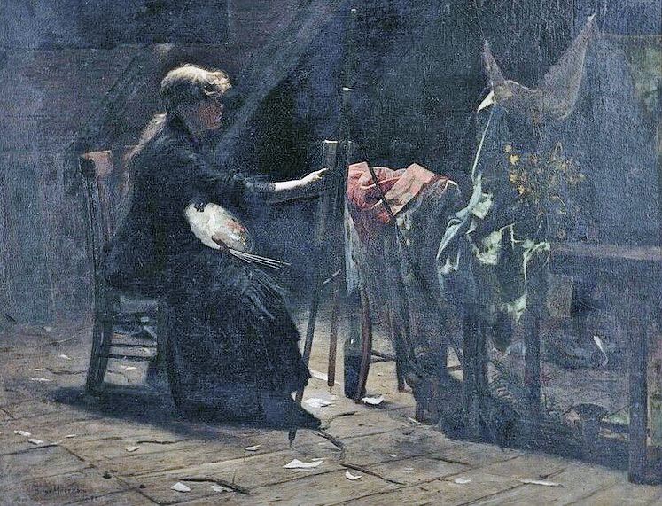 Lovell Birge Harrison : Un artiste à son chevalet (1882)